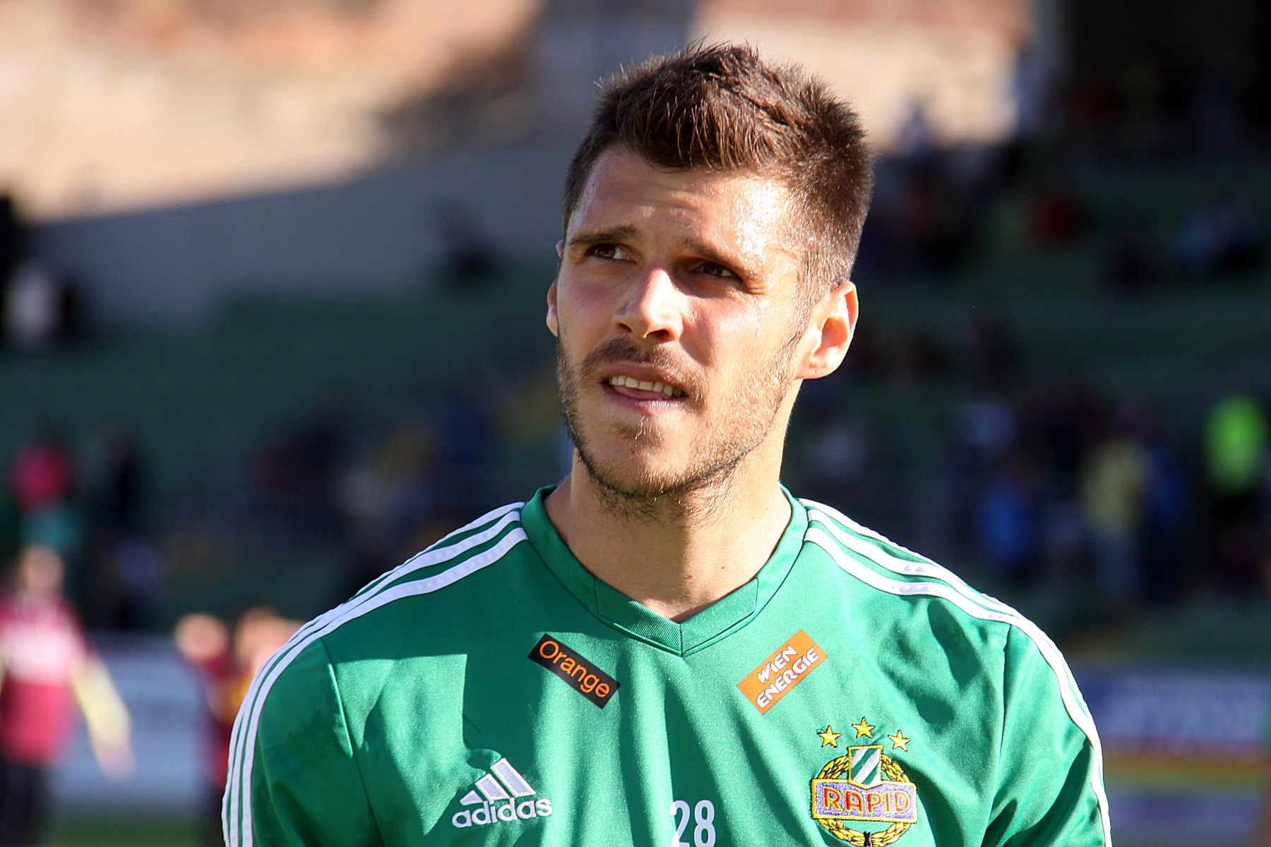 Meisterschaftsspiel der österreichischen Bundesliga: SV Mattersburg gegen SK Rapid Wien am 18. Mail 2013 (2:0)] im Mattersburger Pappelstadion.] - Das Foto zeigt Christopher Trimmel (SK Rapid Wien).